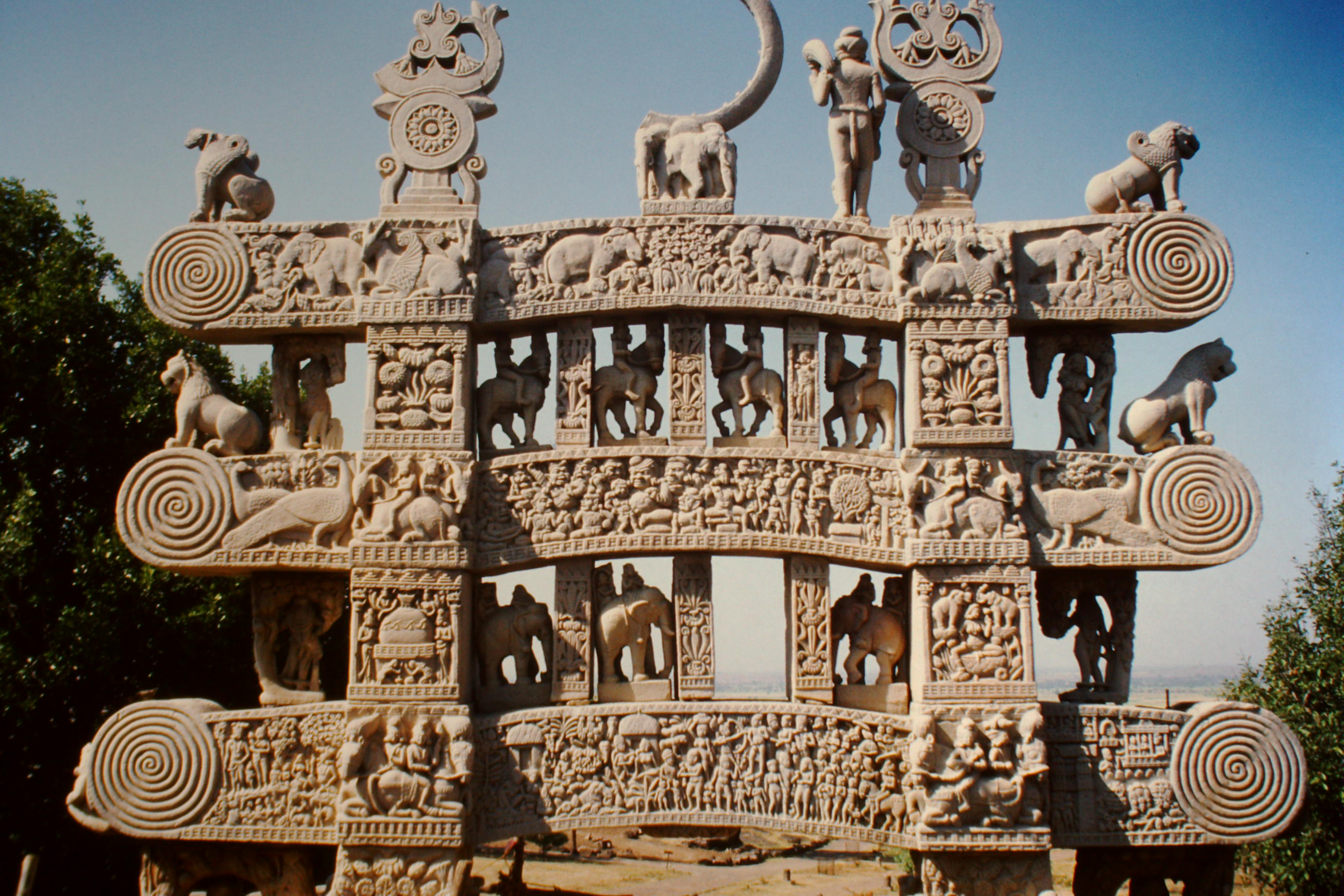 Sanchi, Stupa 1 (Nord-Torana)